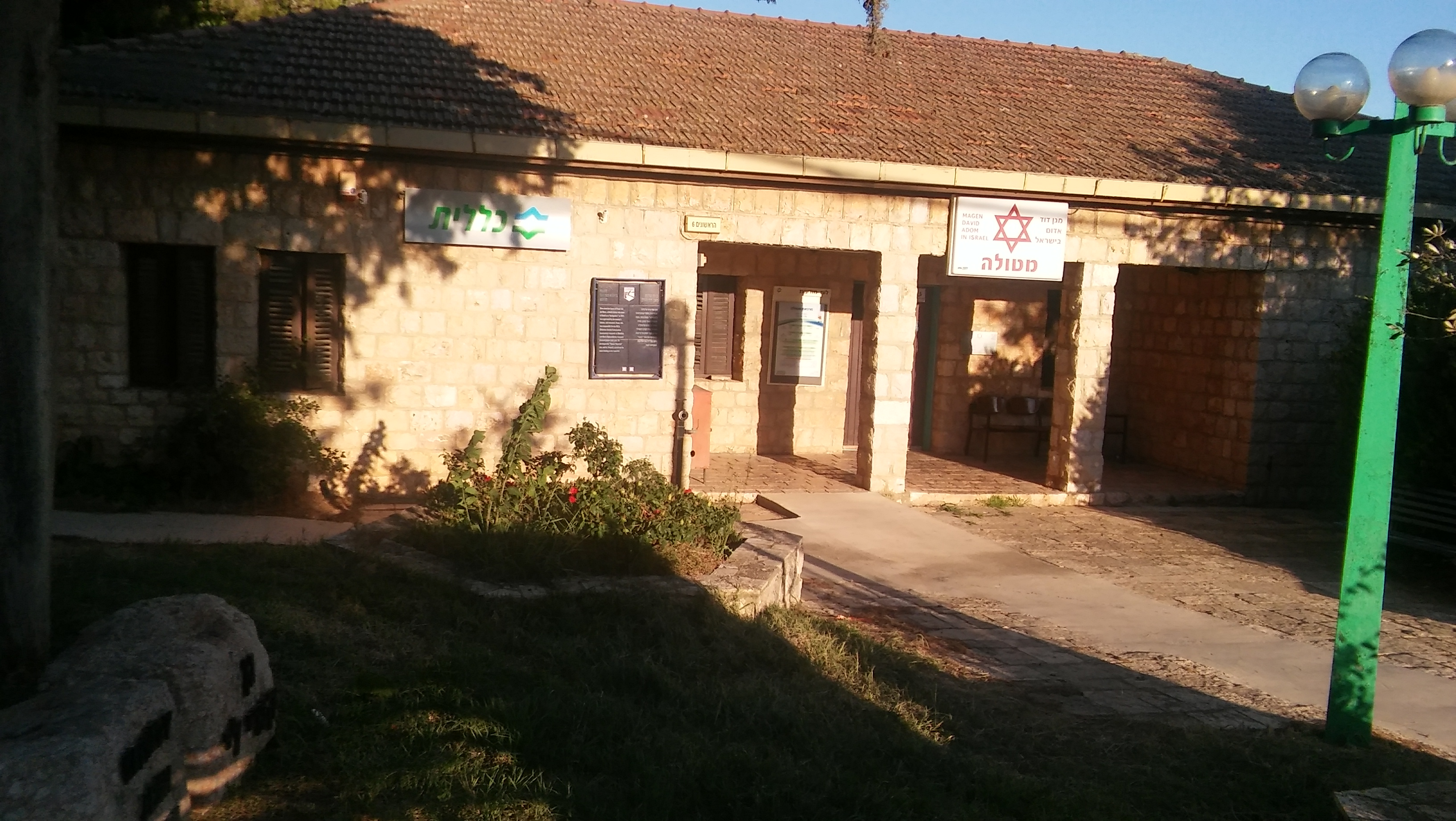 מטולה - רחוב הראשונים - בית פרנץ ואן דר הורן